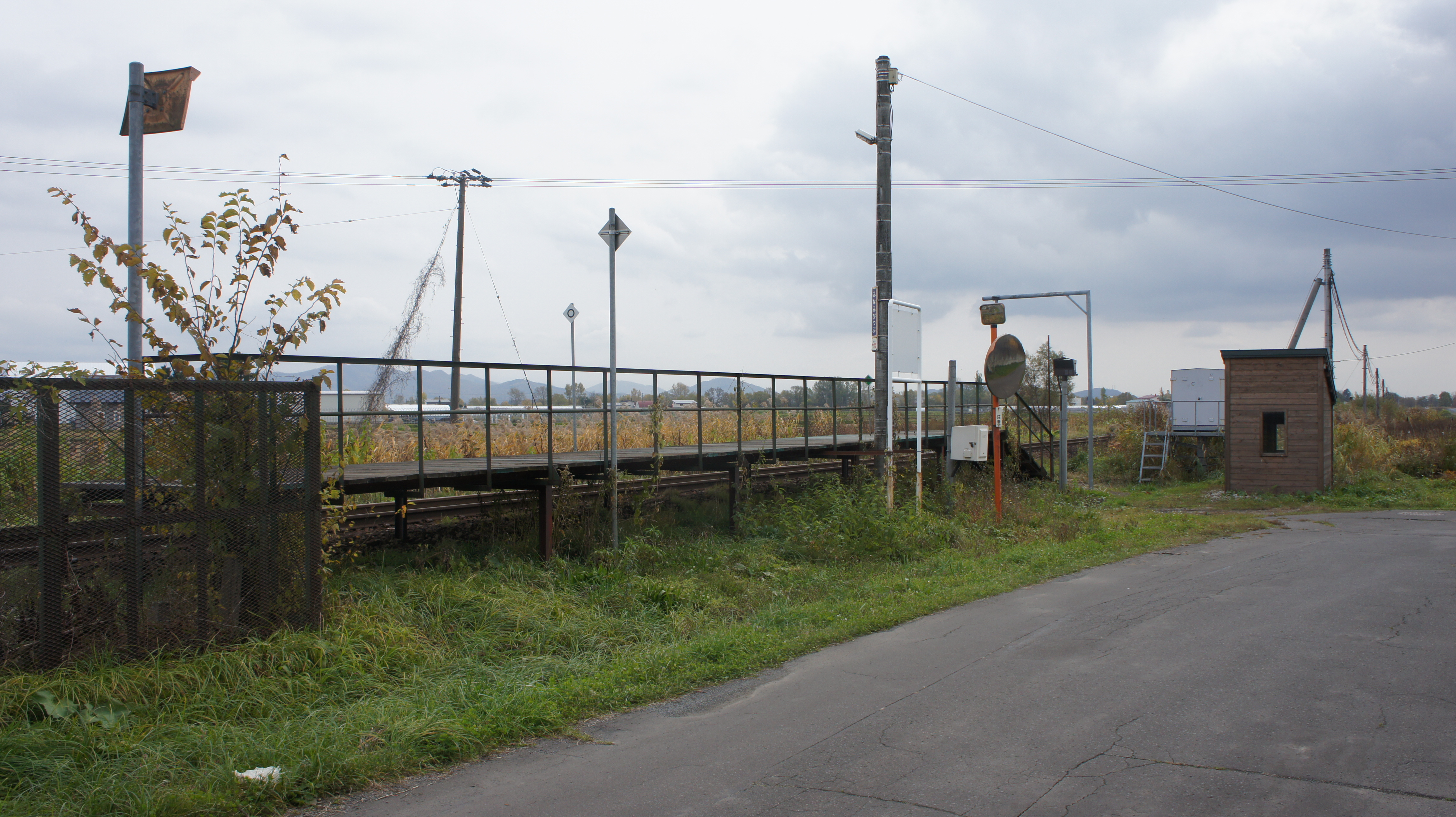 JR宗谷本線・南比布駅全景 Sony NEX-3